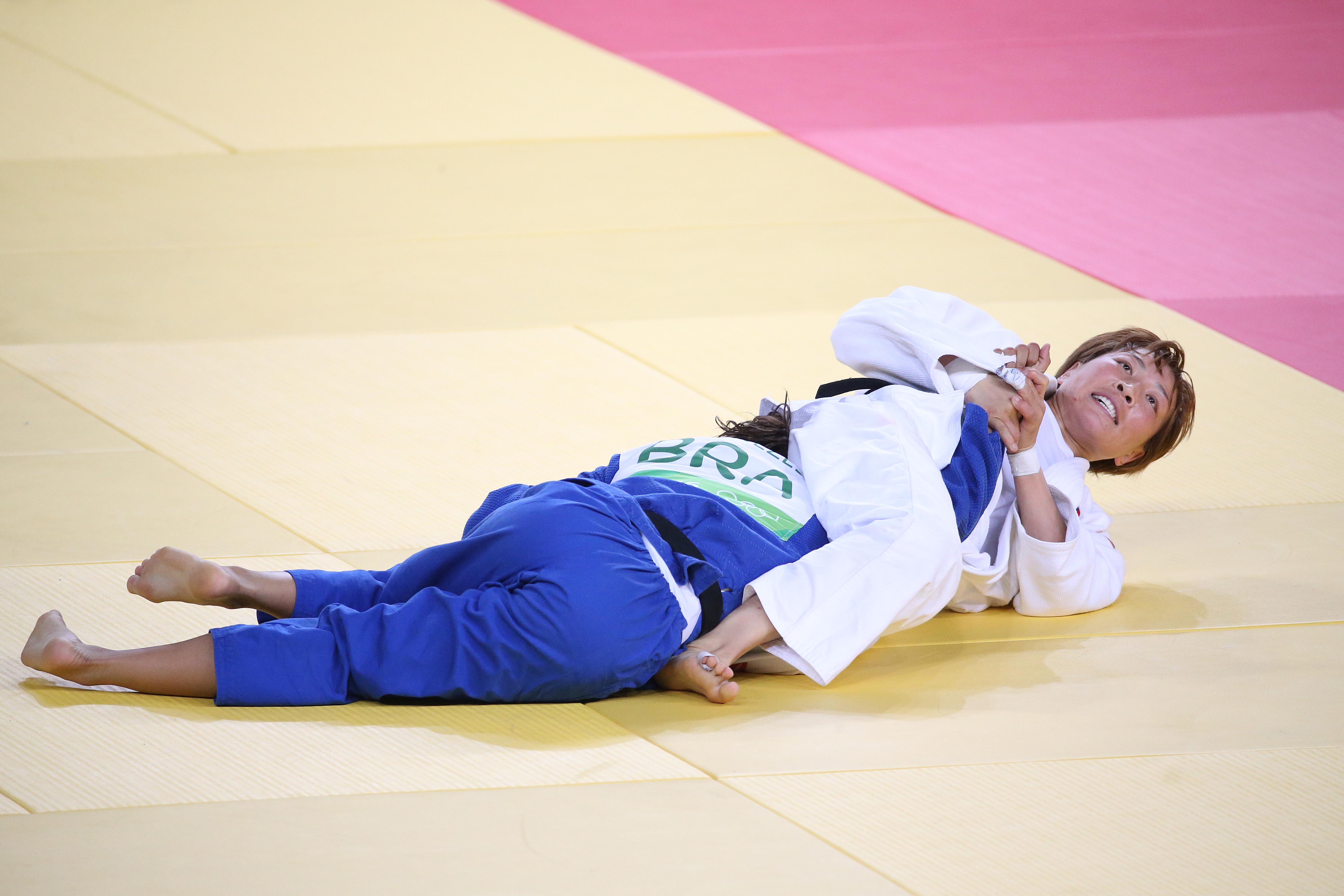 06 de Agosto de 2016 - Rio 2016 -Judô- Sarah Meneses perde a repescagem para atleta da Mongólia Munhkbat.